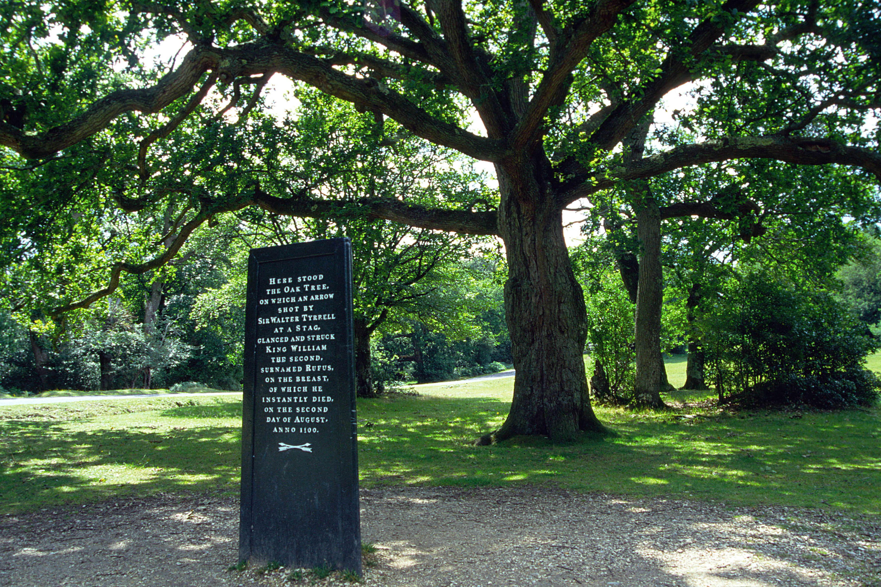 Rufus-Stein im New Forrest